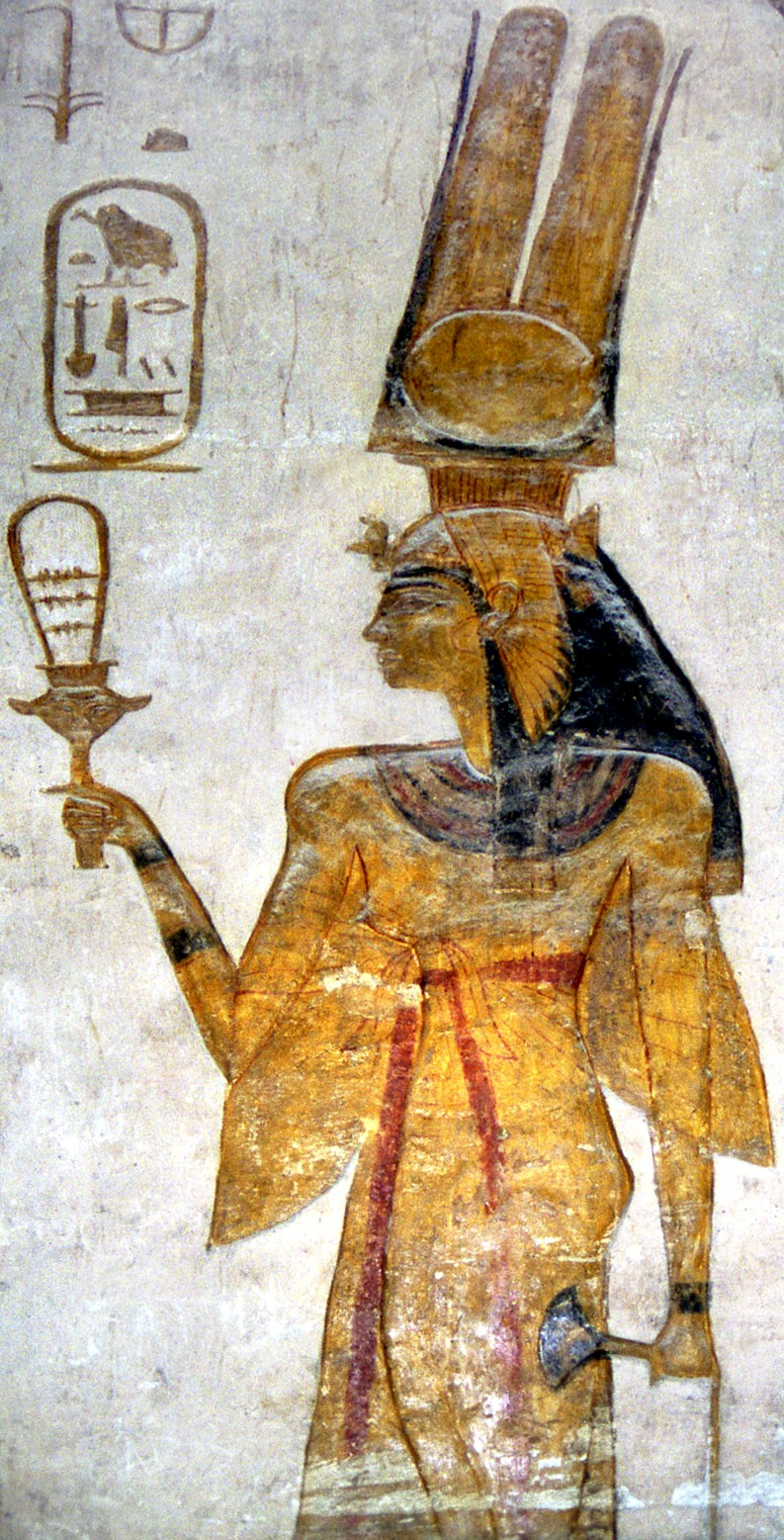 Abu Simbel, Kleiner Tempel, geweiht Nefartari der Gemahlin Ramses II. und Göttin Harthor, Nefartari mit Sistrum